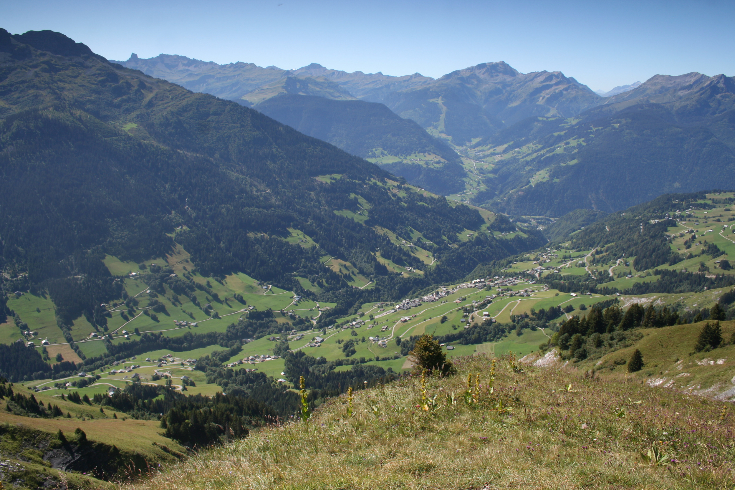 Vue sur le Beaufortain depuis le Mont Clocher : Hauteluce, Beaufort et Arêches